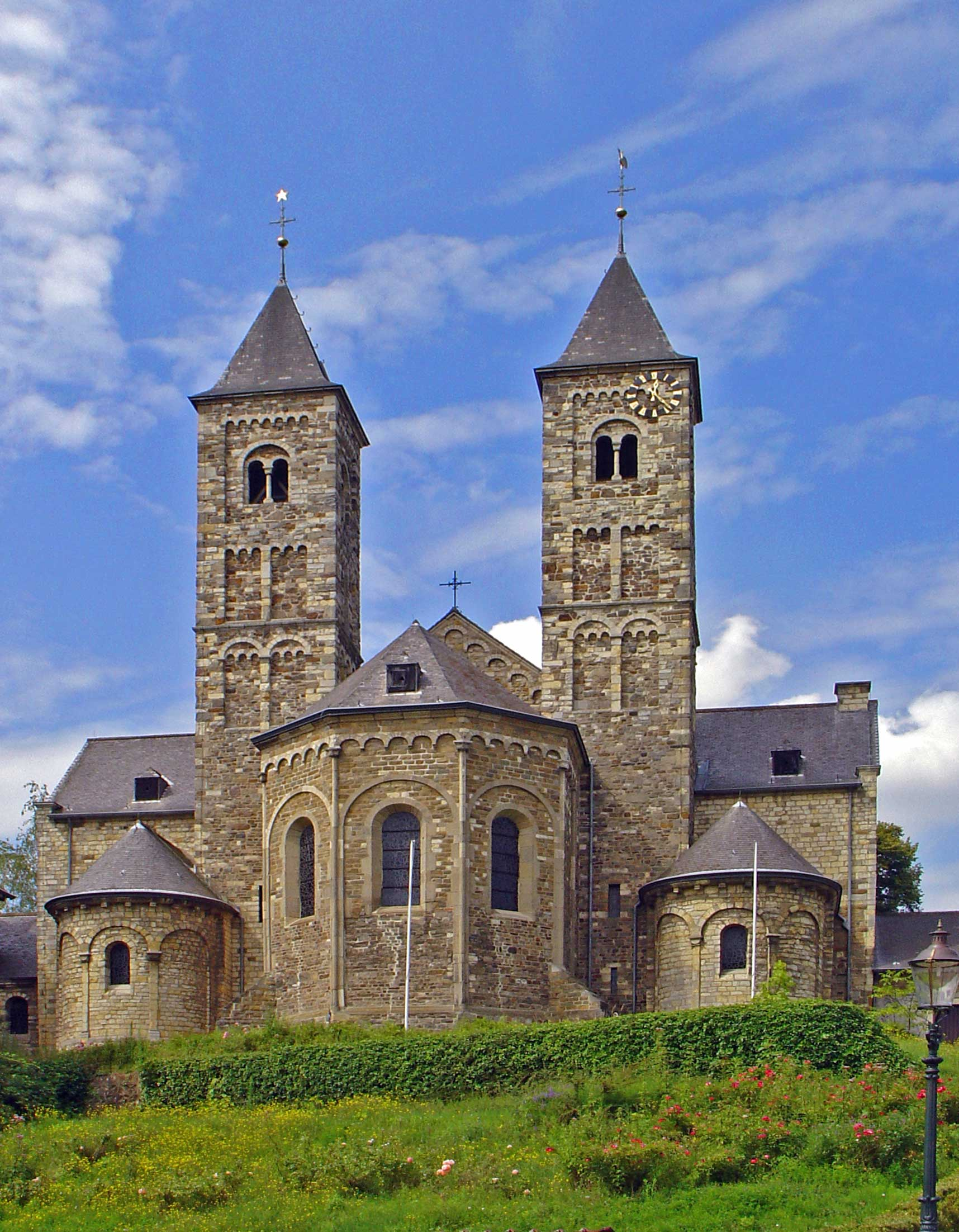 Basiliek van Wiro, Plechelmus en Otgerus in Sint Odilienberg